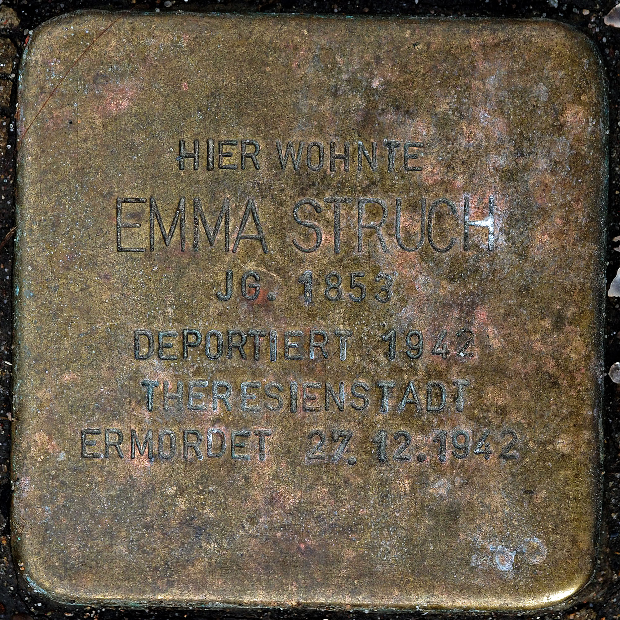 Stolpersteine MG: Struch, Emma